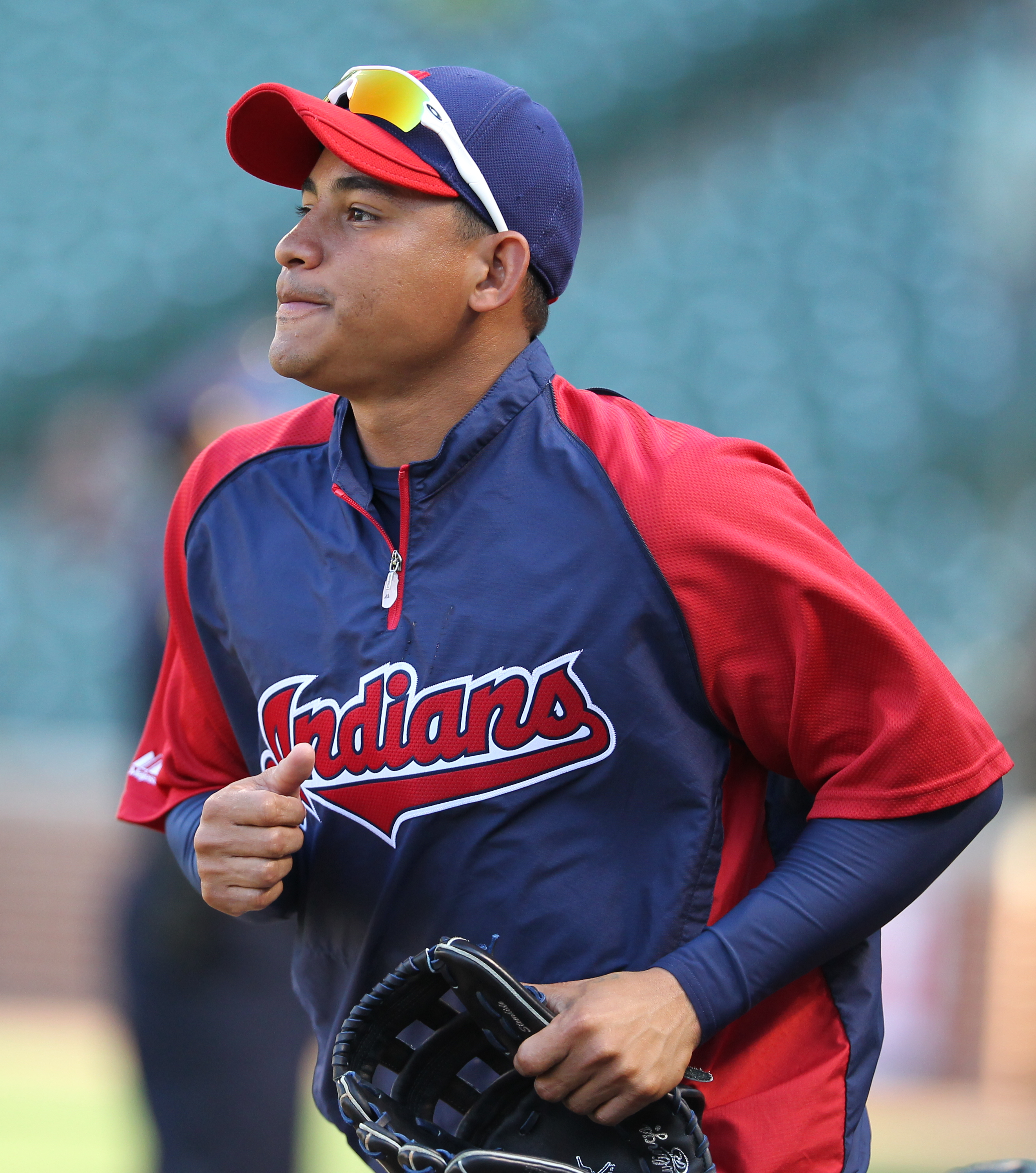 Ezequiel Carrera